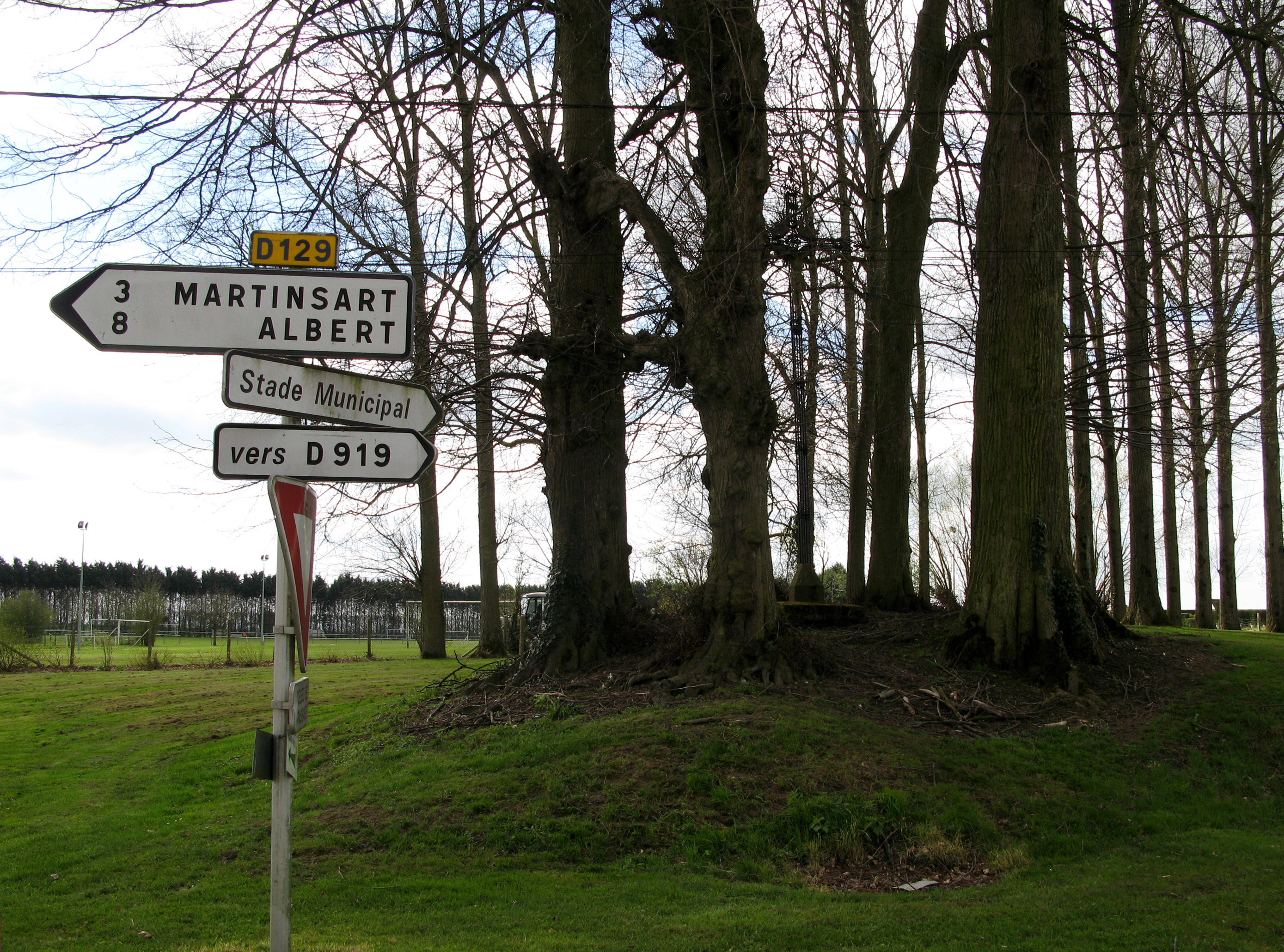 Englebelmer (Somme, France) - Le calvaire, dressé sur sa petite butte, est caché par les arbres, devant le stade, au Sud du village.